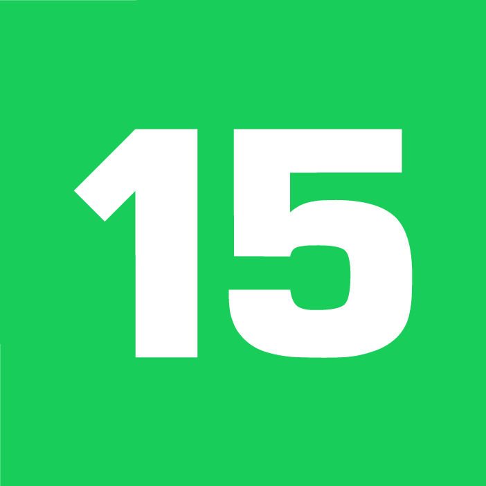 Nuo 2016 m. balandžio galiojantis naujienų portalo 15min logotipas